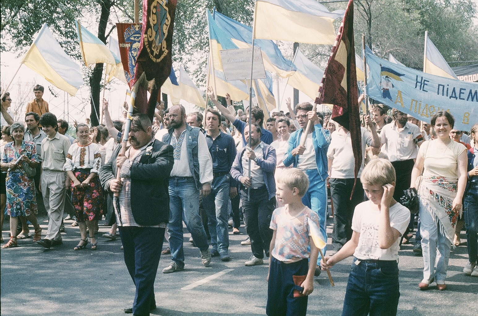 500 років Українському козацтву. 1990.: фото